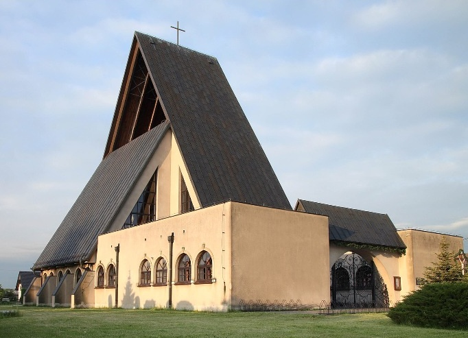 Kościół Matki Bożej Wspomożenia Wiernych w Łowoszowie